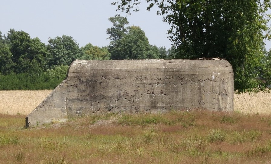 Jeden za čtyř bunkru ve Faustynově. Tento je na poli "mokrého konce" Faustynova, nejzachovalejší. Bunkry jsou cca z roku cca 1940. Nikdy nepoužité. Trvale zavřené.